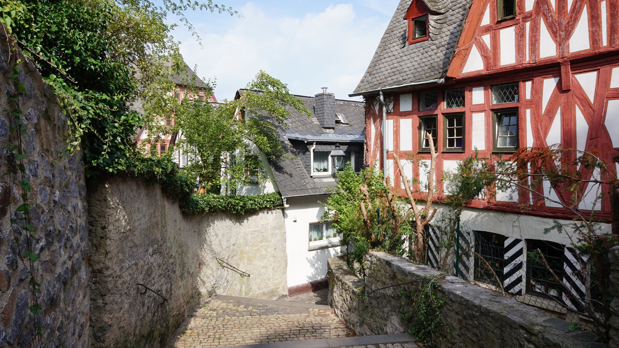 Blick die "Langen Treppen" unterhalb des Limburger Doms (Landkreis Limburg-Weilburg, Deutschland) hinab in Richtung Nordwesten. Streckenabschnitt des Lahnwanderwegs.